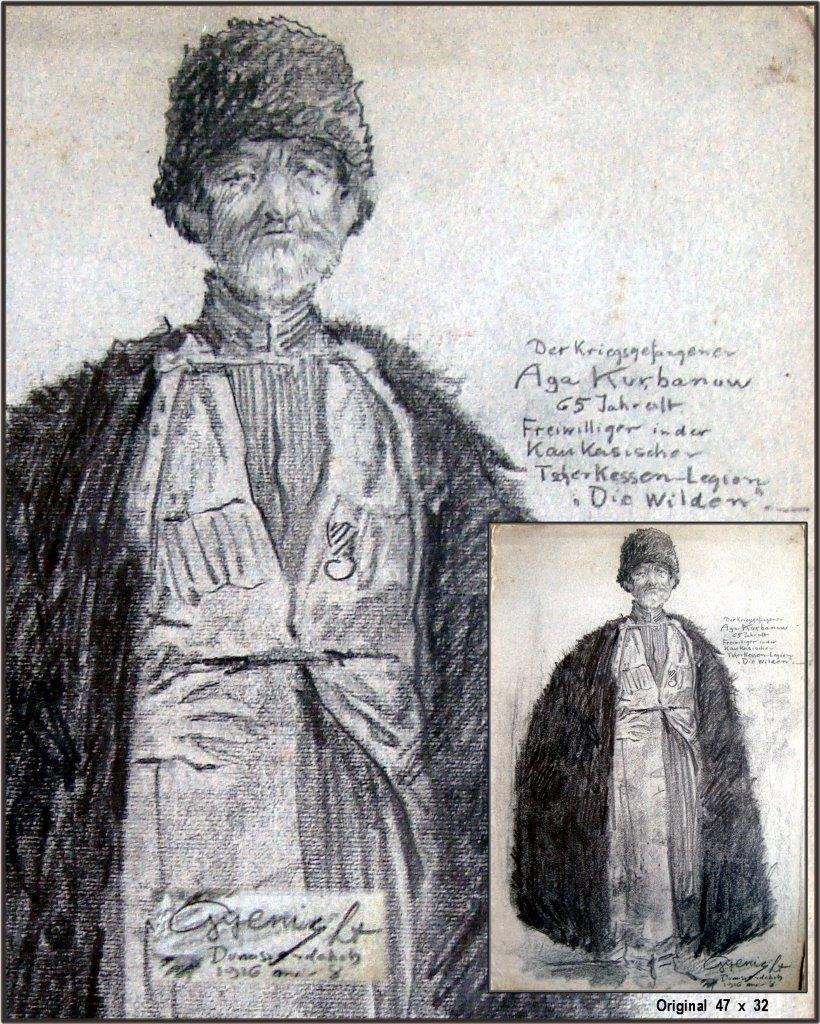 Hans Gyenis, Zeichnugsporträt des Kgf. Aga Kurbanow, 65 Jahre, alt, Freiwilliger der Kaukassischen Tscherkessen-Legion "Die Wilden" gemalt am 8.Mai 1916 in Dunajská Streda (Dunaszerdahely)